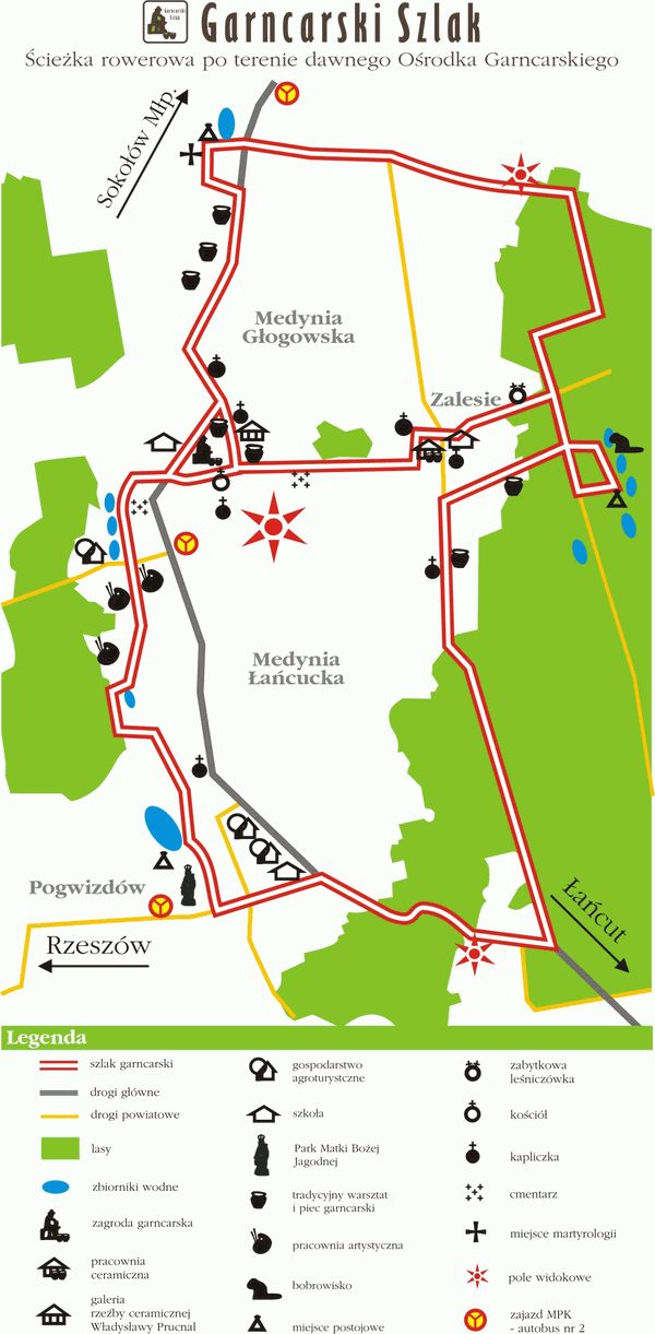 Trasa szlaku garncarskiego w okolicy Medyni Głogowskiej i Medyni Łańcuckiej, gmina Czarna w powiecie łańcuckim